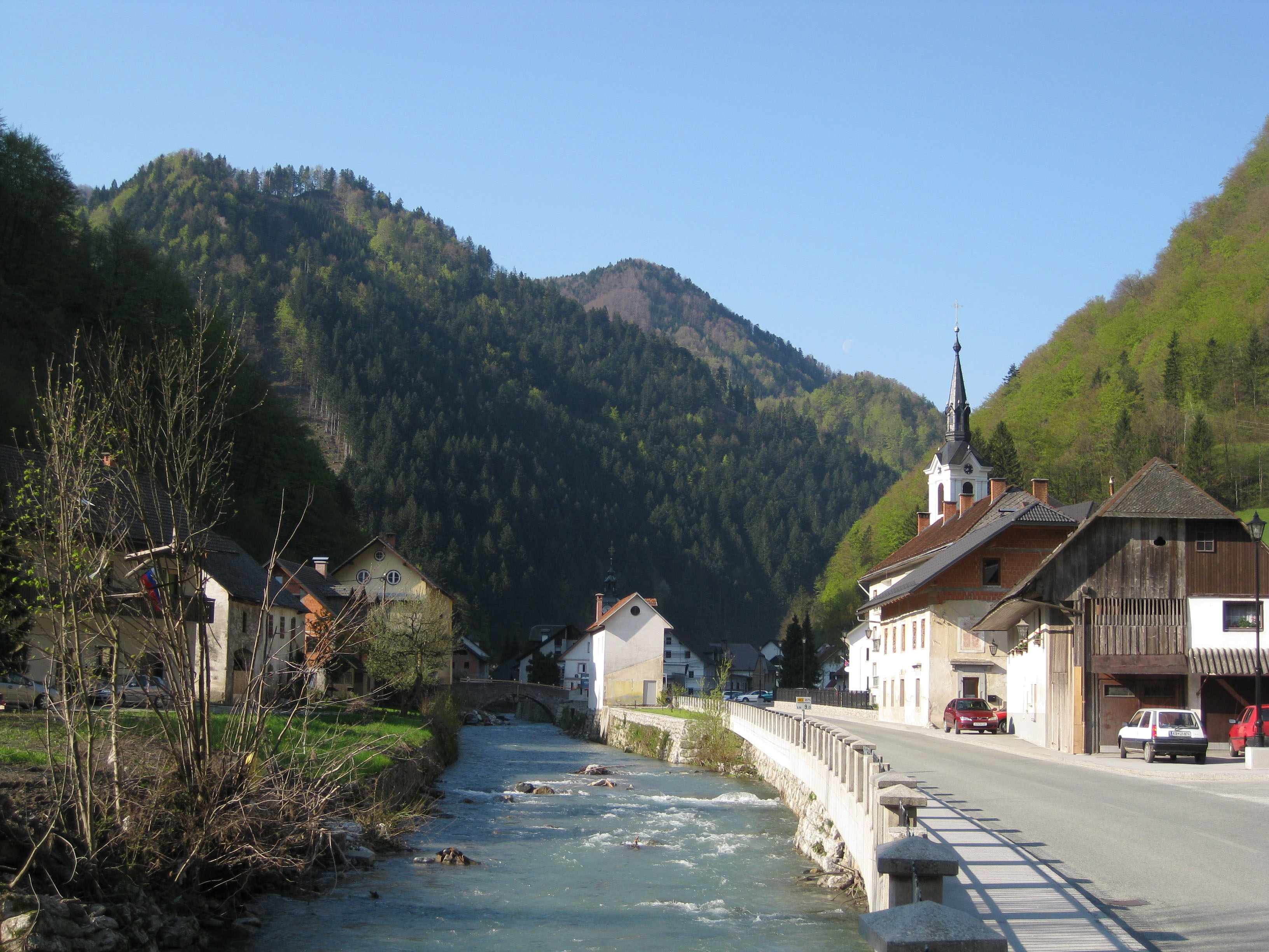 Železniki, town in Slovenia